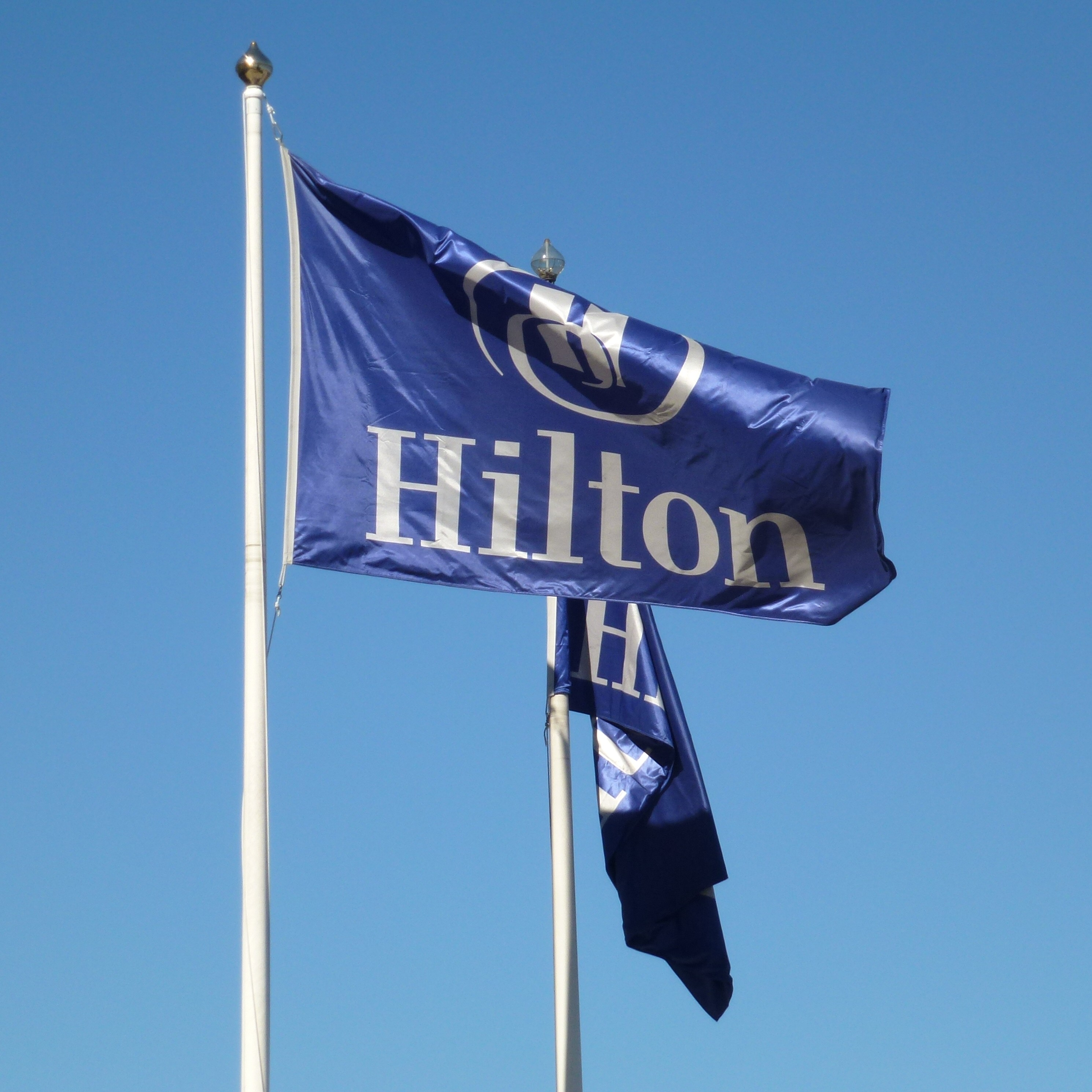 Hotel Hilton flaggor